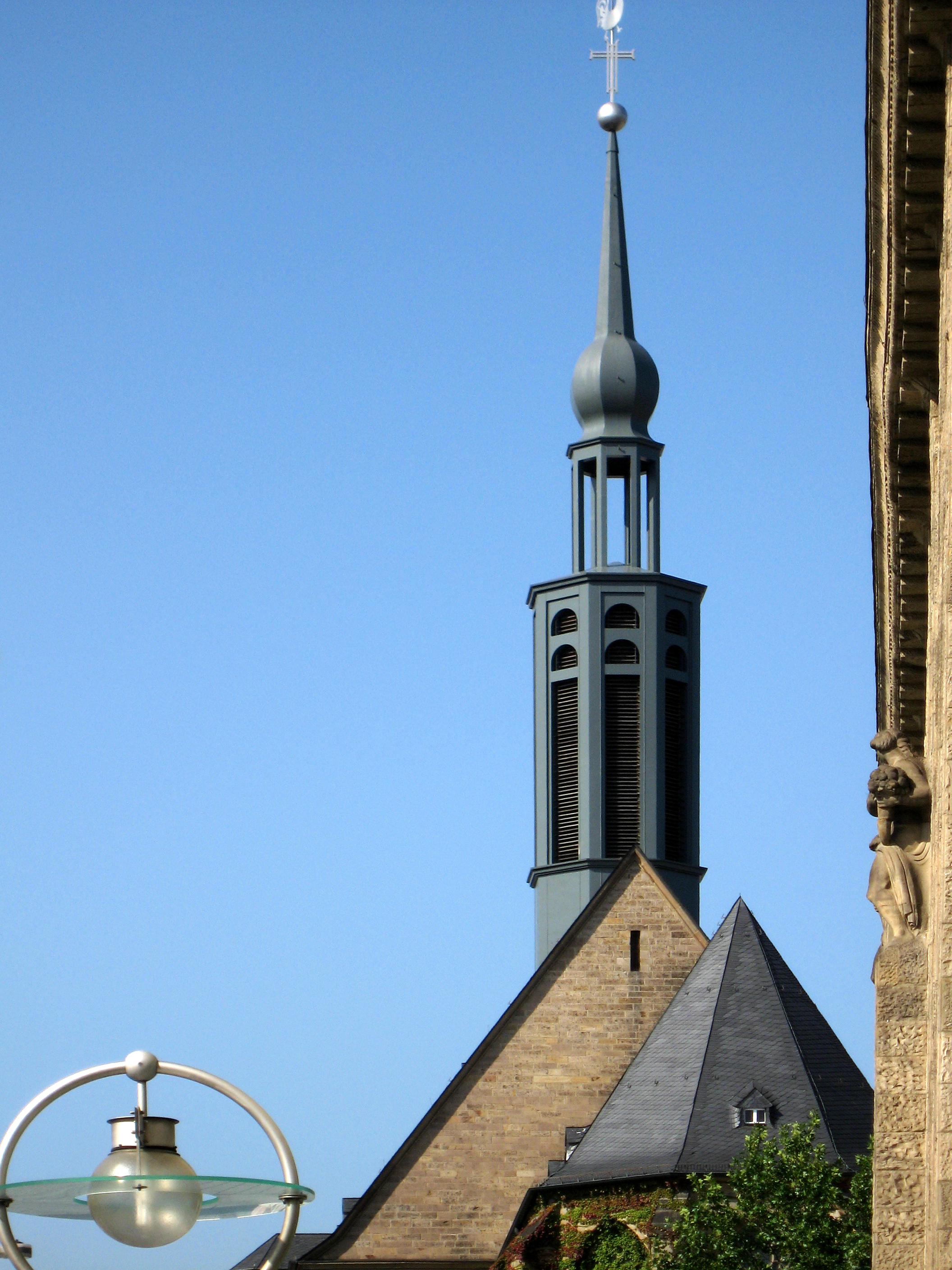 Dortmund, Propsteikirche, Blick auf die Ostseite vom Hansapltz, rechts Karstadt-Fassade